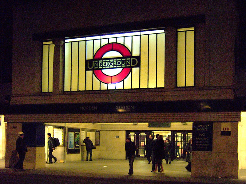 Morden underground station, designed by Charles Holden